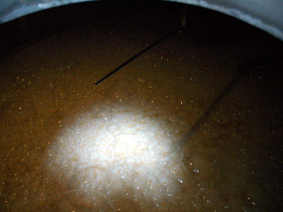 正在發酵中的麥芽酒汁 麥芽溶解過濾後得到的麥汁(Wort)在添加了適當的酵母之後，被放入發酵槽(Wash Back)中進行發酵。在發酵的過程中會產生大量的熱與以二氧化碳為主的氣體，如果此時將臉湊進槽中吸一口氣，嗆鼻的氣味往往會讓人忍不住鼻涕眼淚狂流！ 本圖片由上傳者User:SElephant拍攝於2004年8月。